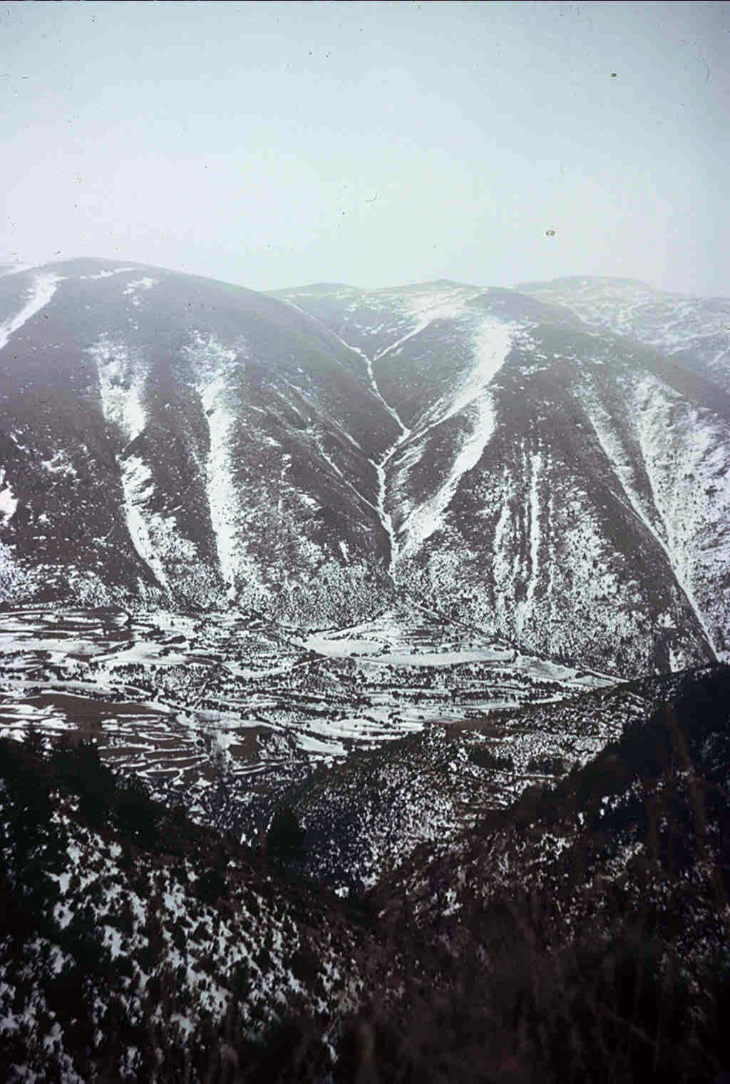 Un torrente en Los Pirineos aparece nítidamente definido por la nieve concentrada en las laderas occidentales que se encuentran a sotavento. Se distinguen: la cuenca de recepción, con su típica forma de embudo, el canal de desagüe y el cono de deyección al fondo. Foto tomada desde la carretera de Ribes de Fresser a La Molina